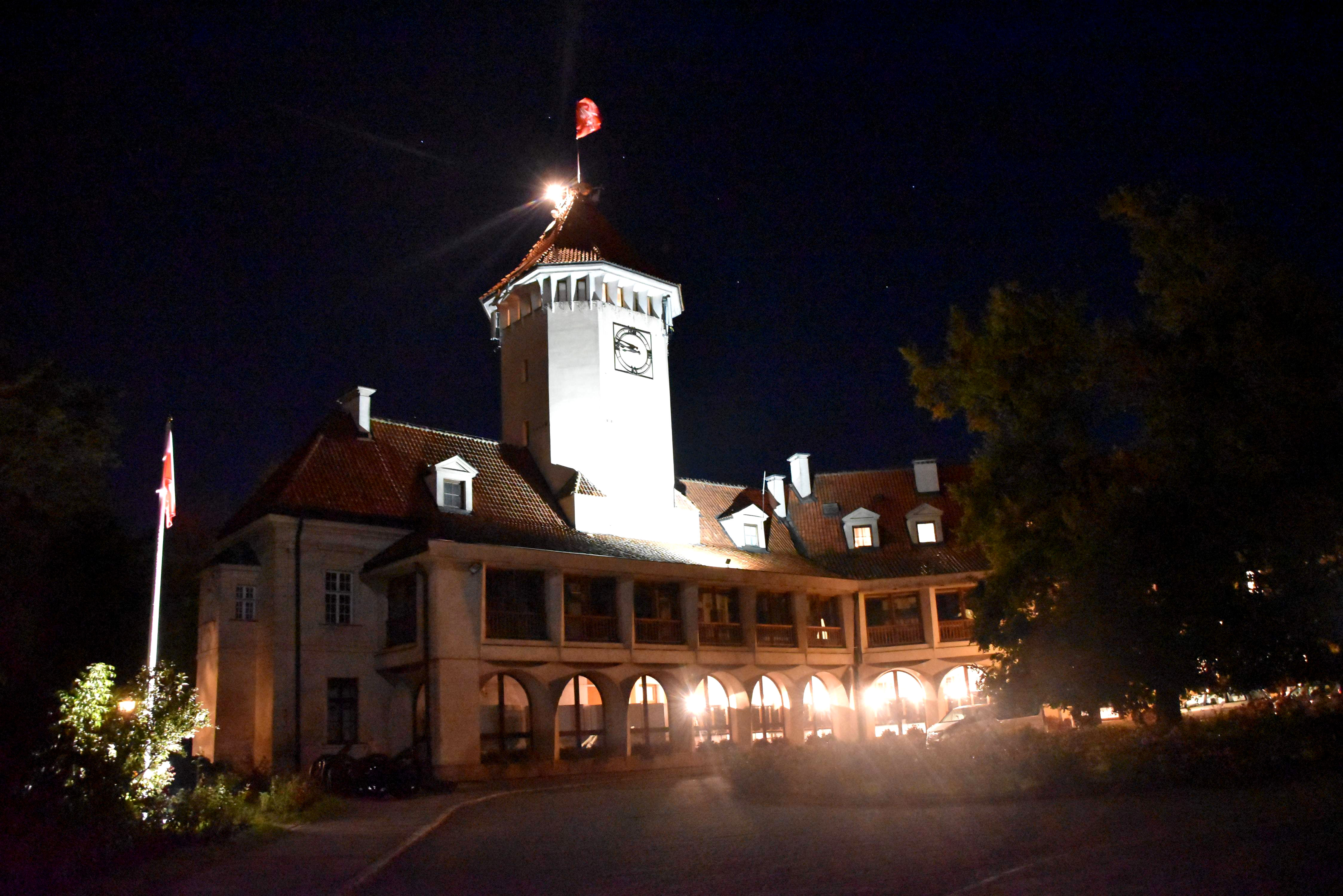 Pułtusk - Ehemalige Bischofsburg, heute als Hotel und Veranstaltungszentrum genutzt